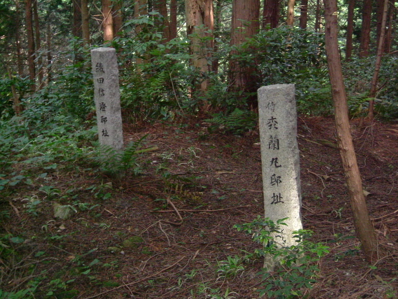 安土城織田信澄・森成利邸跡。滋賀県蒲生郡安土町